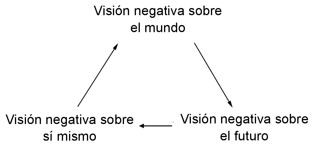 Tríada cognitiva de Beck creado a partir de File:Beck's CognitiveTriad.png